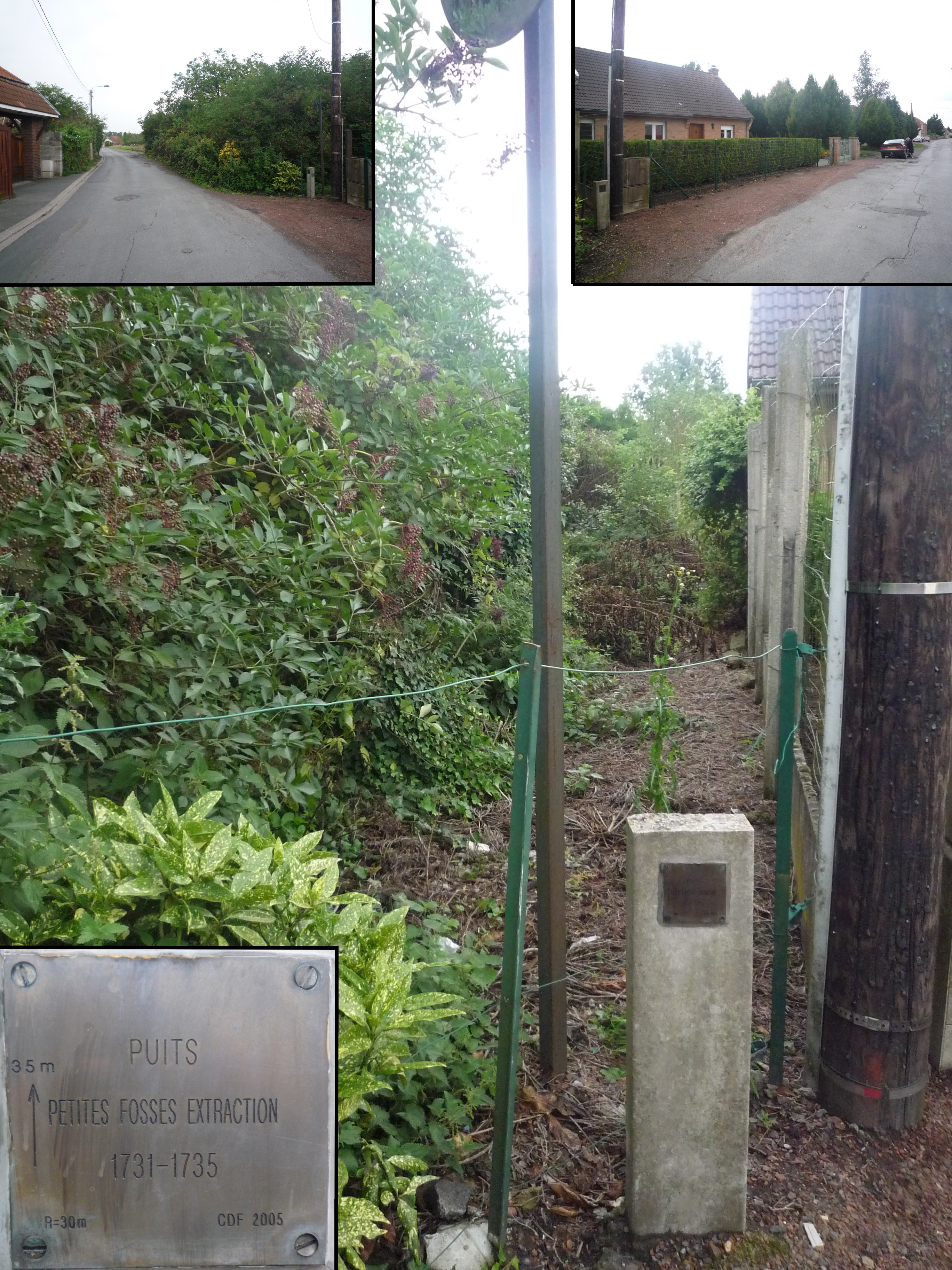 Puits Petites Fosses Extraction de la Compagnie des mines d'Anzin à Fresnes-sur-Escaut, Nord, Nord-Pas-de-Calais, France.